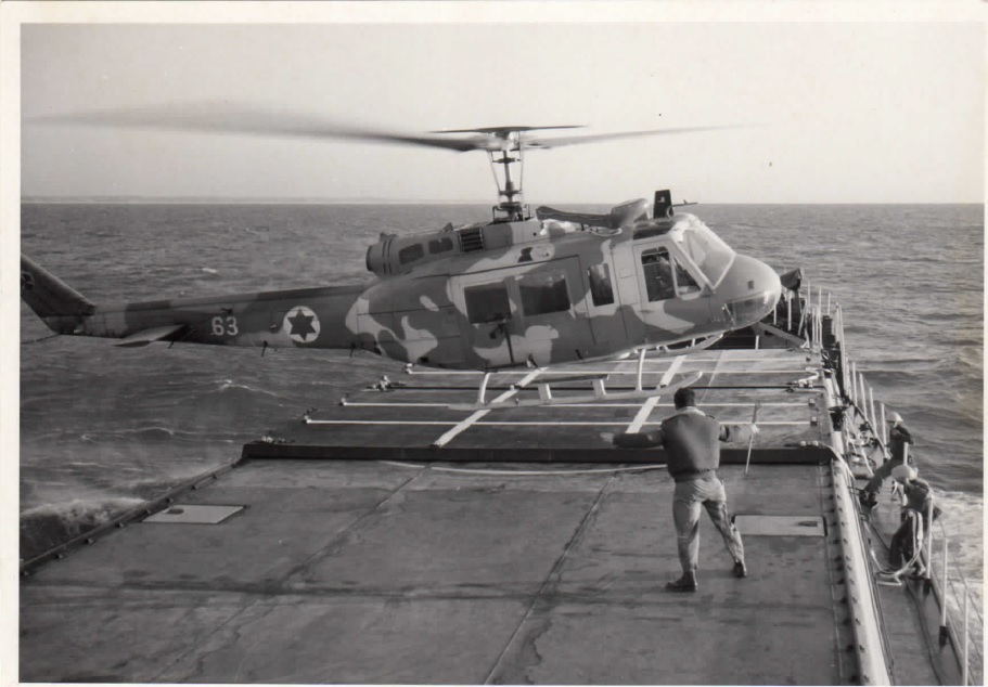 אימון נחיתת מסוק על סיפון נחתת מדגם 60 מ'